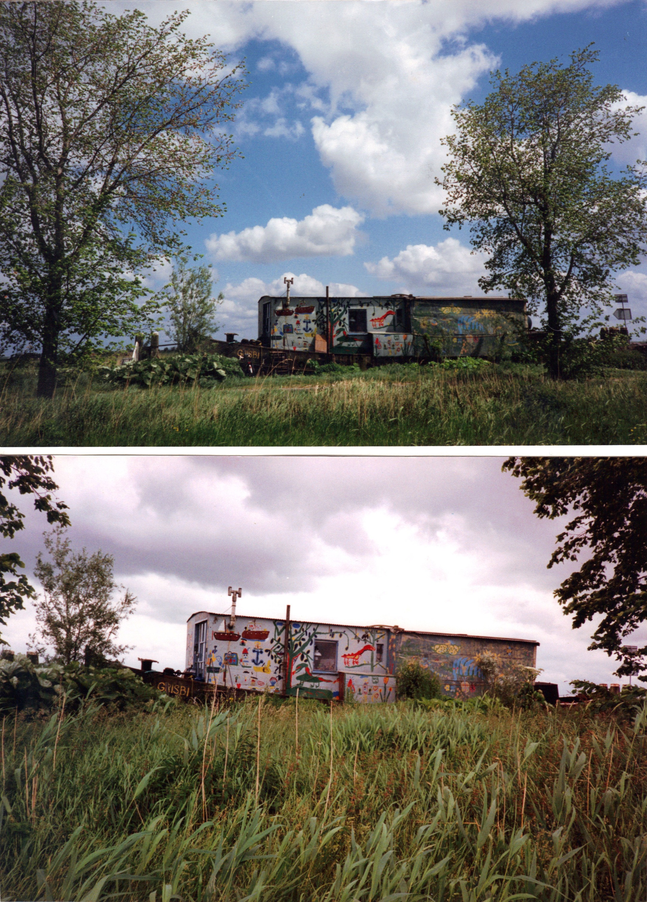 De woonboot van Paul Koning. Aan de monding van de Eem had hij de ligplaats en kinderen van de lokale jachthaven 't Raboes waren door Paul uitgenodigd de buitenkant te beschilderen.